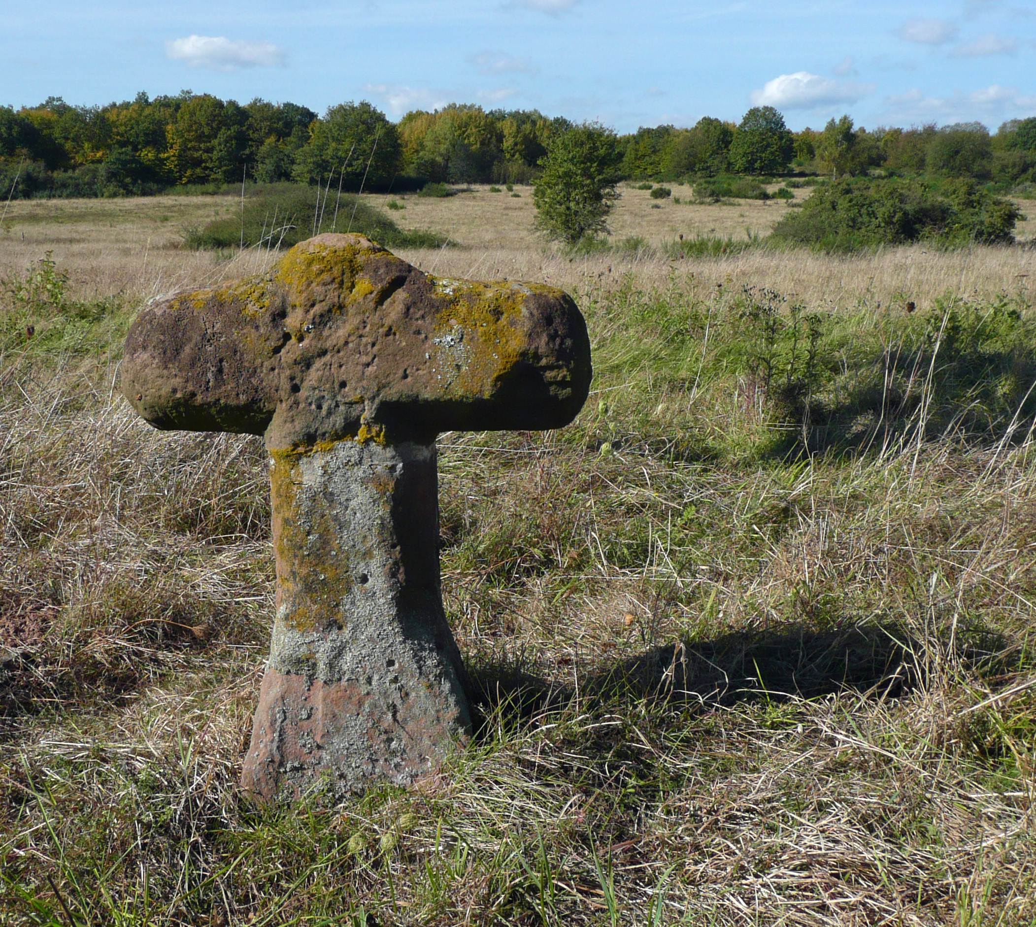 Sandsteinkreuz an der Straße K69 von Marburg Ockershausen nach Cyriaxweimar, von welchem der Flurname 'DER STEINERNE KREUZ ACKER' herrührt. Der obere Schaft ist abgebrochen. Auf der nicht abgebildeten Seite befindet sich ein stark abgewittertes Wappenrelief mit drei herzförmigen Blättern, deren Spitzen in der Mitte zusammenstoßen. Ansicht von Südosten. Weblinks: Kreuzstein.eu suehnekreuz.de Lagis Hessische Flurnamen